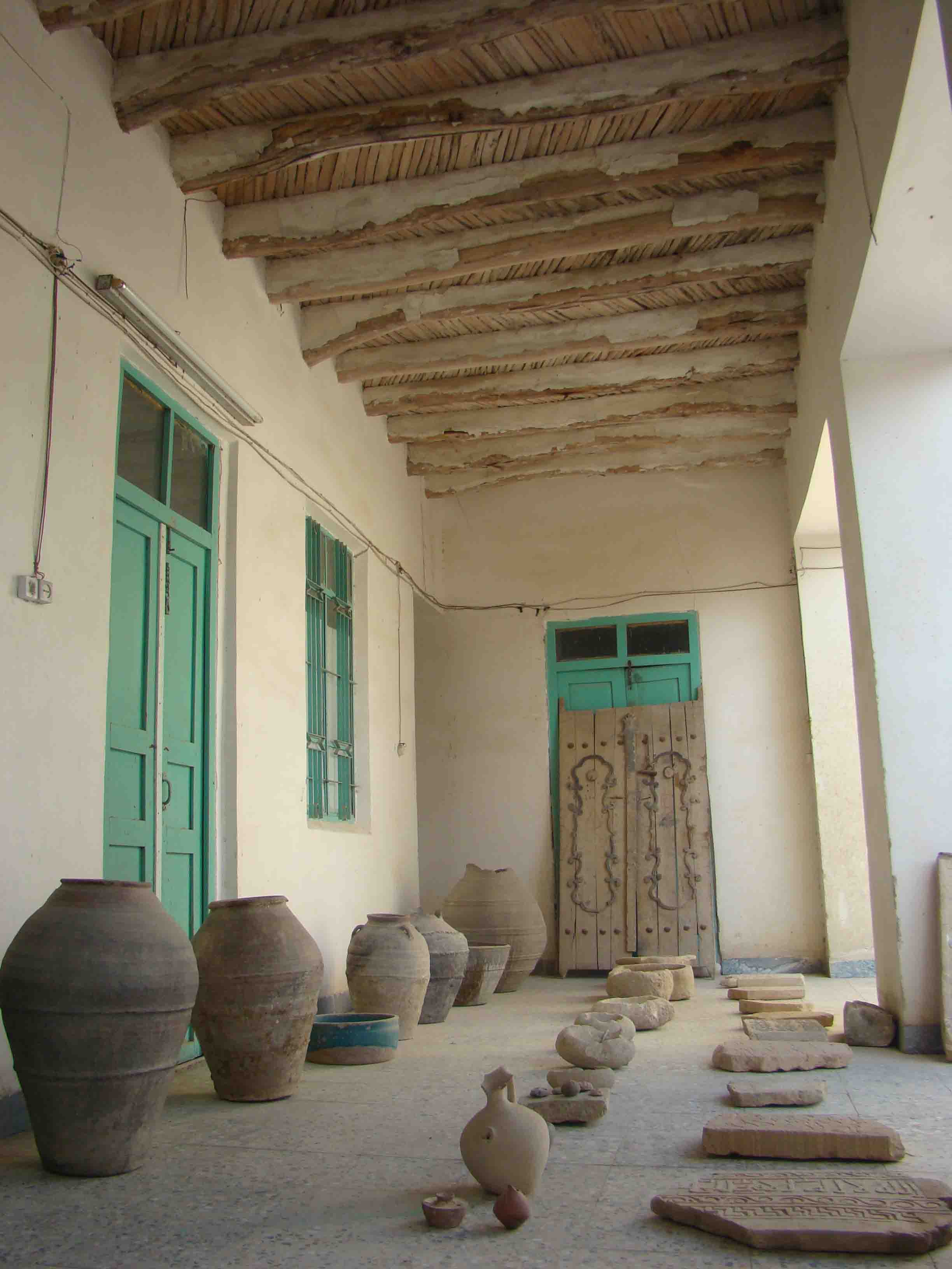 موزه شخصی کرامت اله تقوي